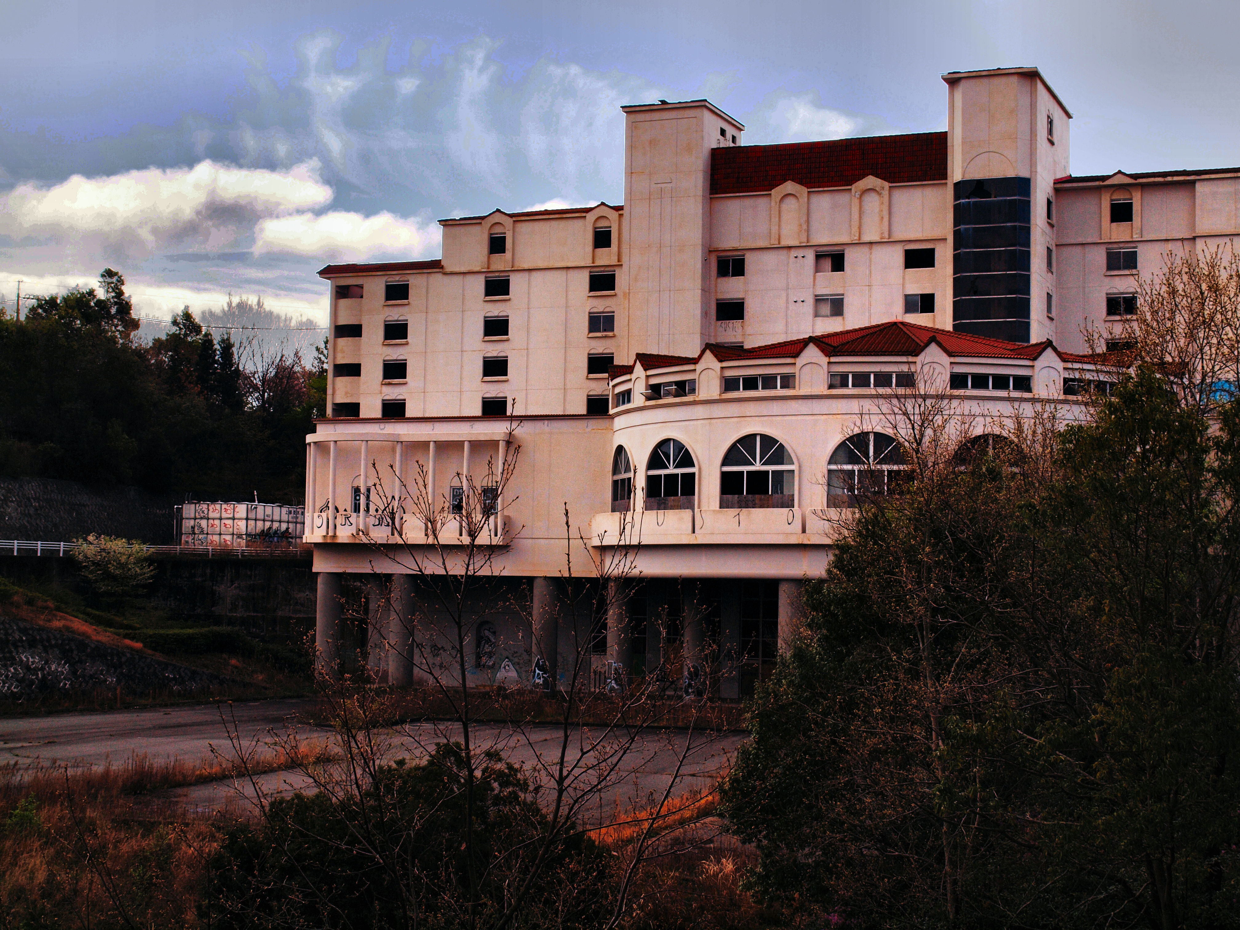 玉野市の王子アルカディアリゾートの建物